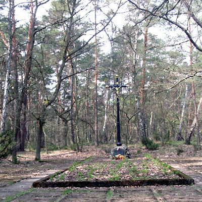 Mogiła powstańców 1863 w Kampinosie